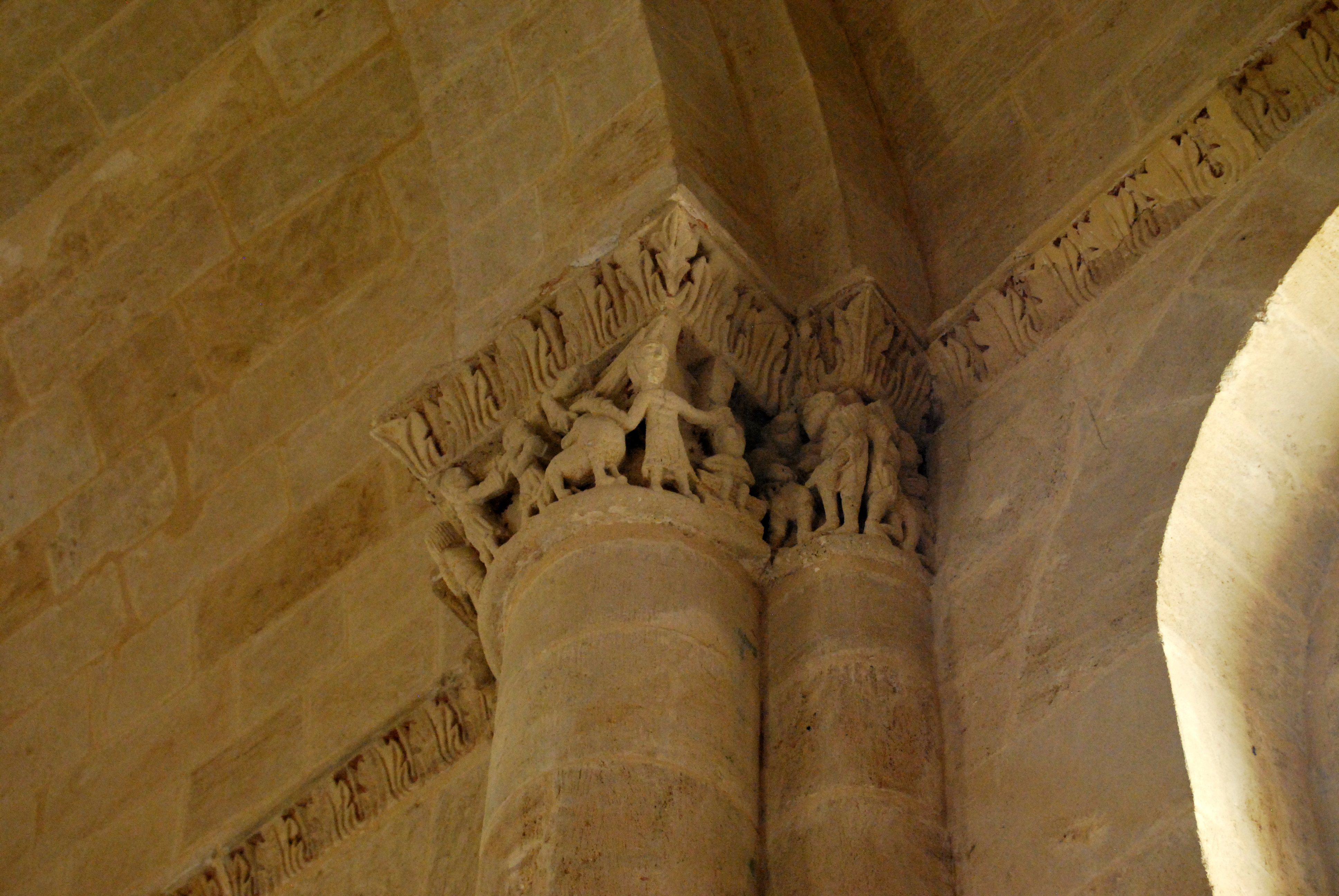 Église Saint-Quentin de Baron (Gironde)